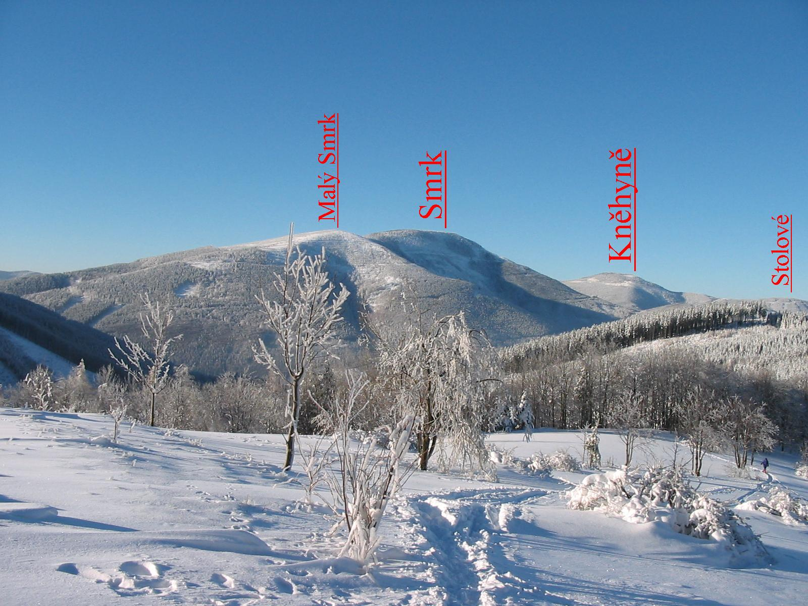 Smrky a Kněhyně z Butořanky